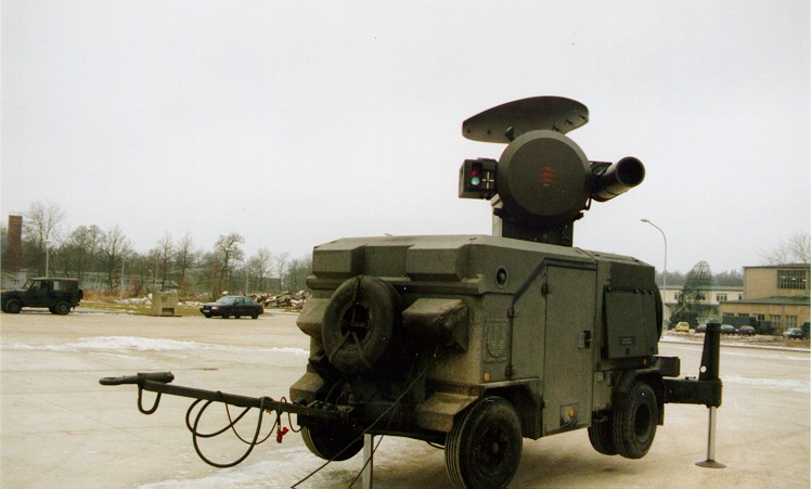 Skyguardkabine mit Radar und Optik